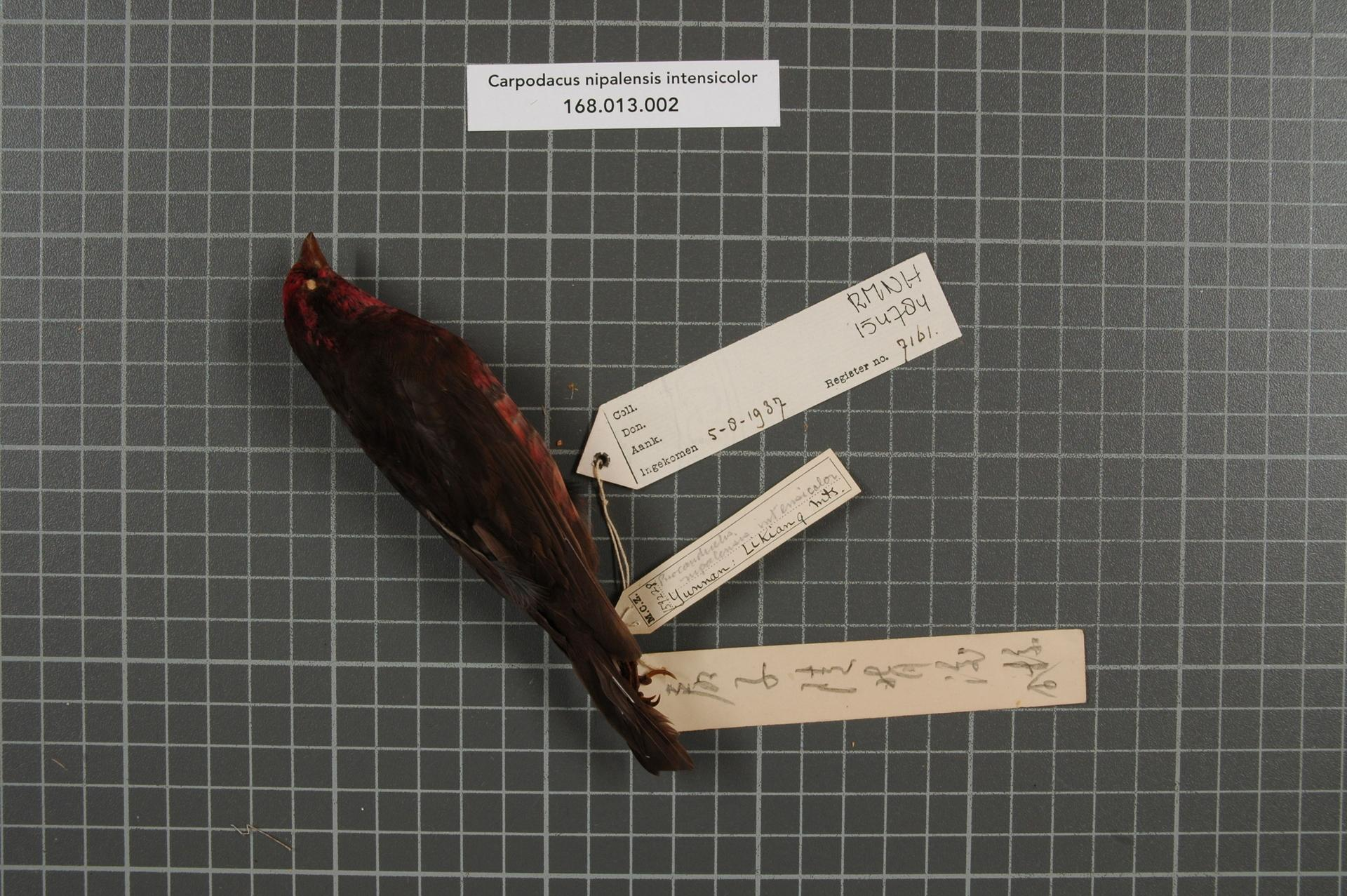 Carpodacus nipalensis intensicolor (Baker, 1925)